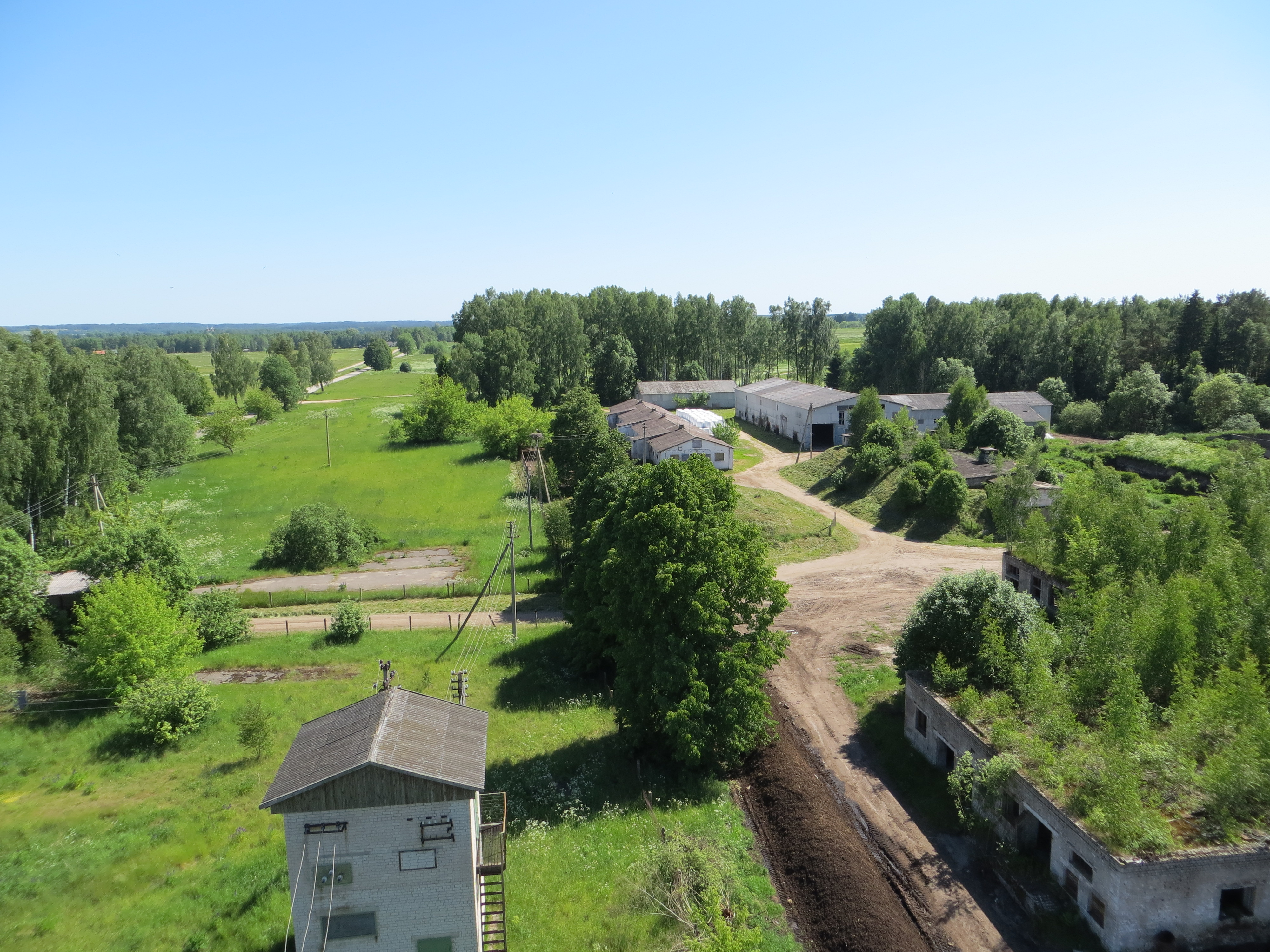 Kavoliai 32300, Lithuania